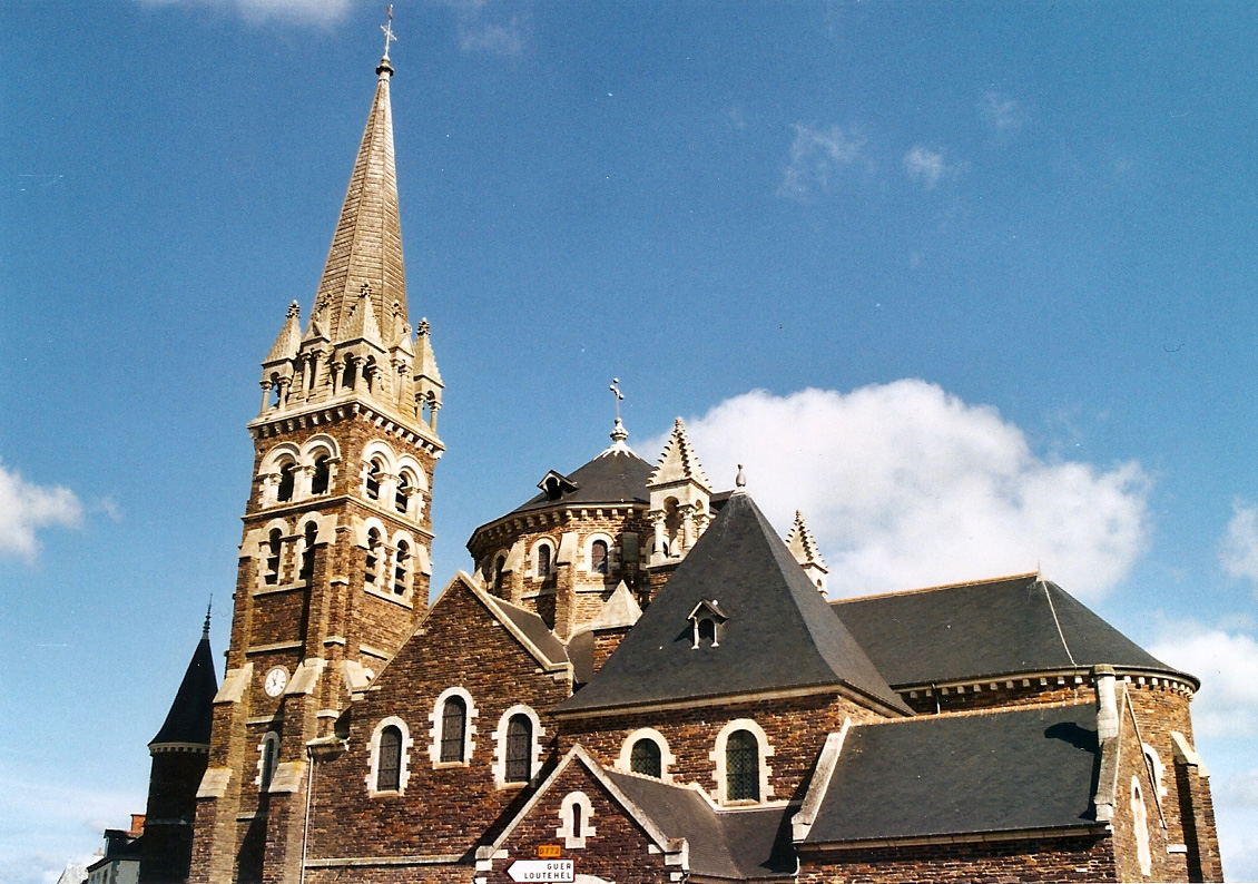 L'église de Maure de Bretagne.